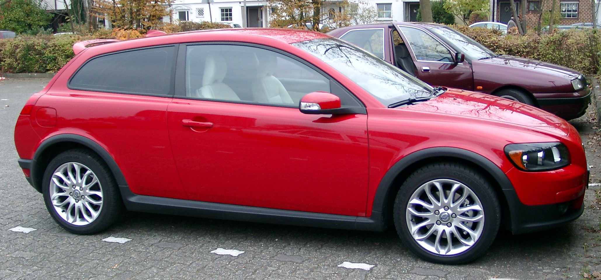 Volvo C30